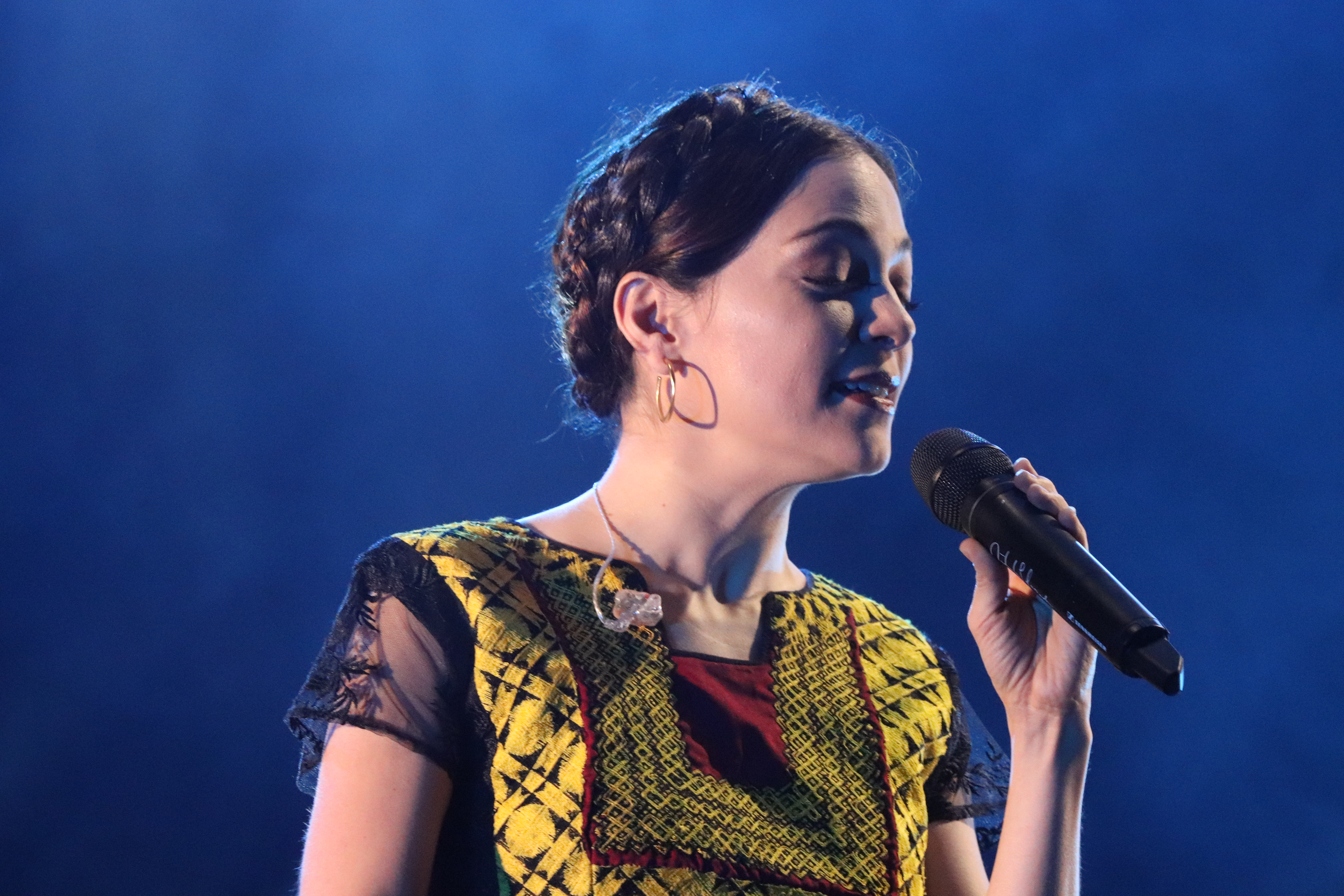 Recital de Natalia Lafourcade el 26 de Abril de 2018 en el Gran Rex